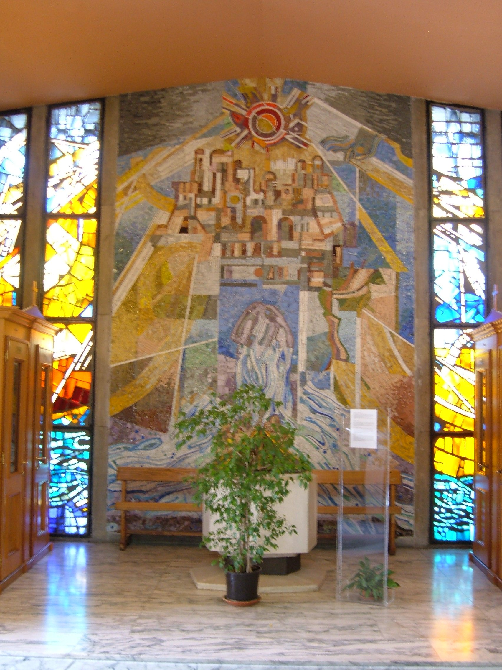 San Pio X (Rome): battistero.